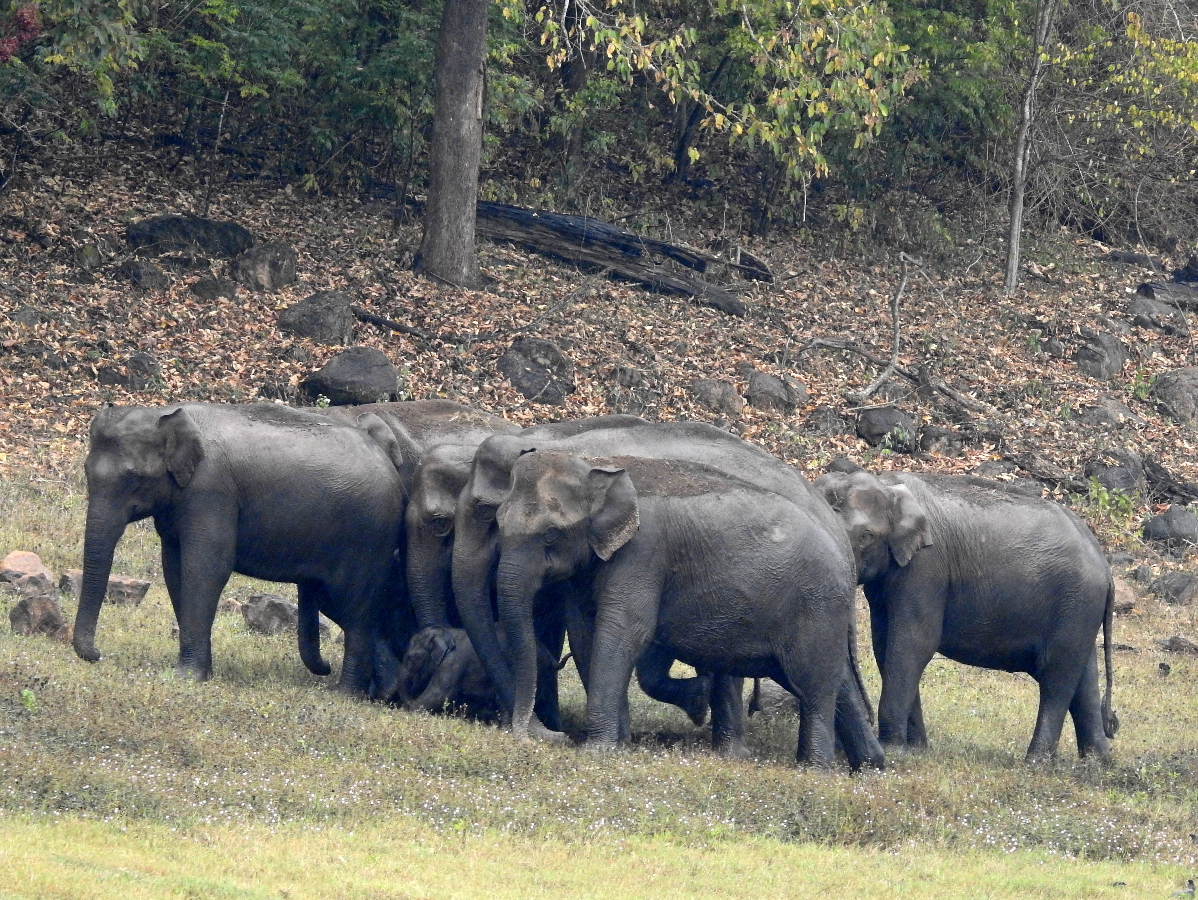 പെരിയാർ കടുവാസങ്കേതത്തിലെ ആനക്കൂട്ടം. തേക്കടി തടാകത്തിൽനിന്ന്